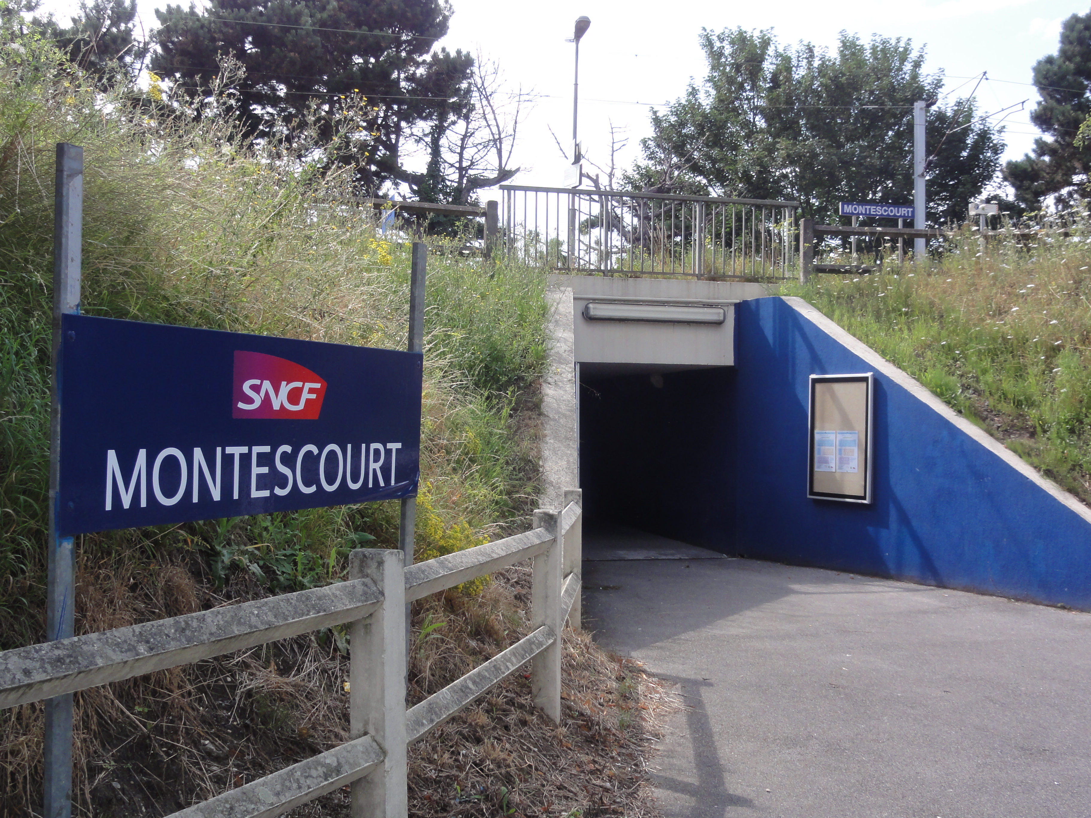 Montescourt-Lizerolles (Aisne) gare de Montescourt (nouvel accès aux quais)